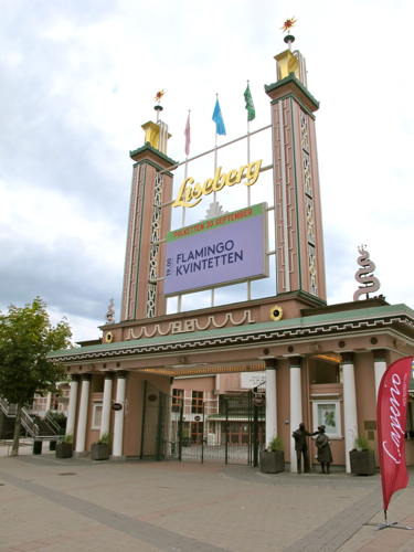 Entrén till Liseberg i Göteborg